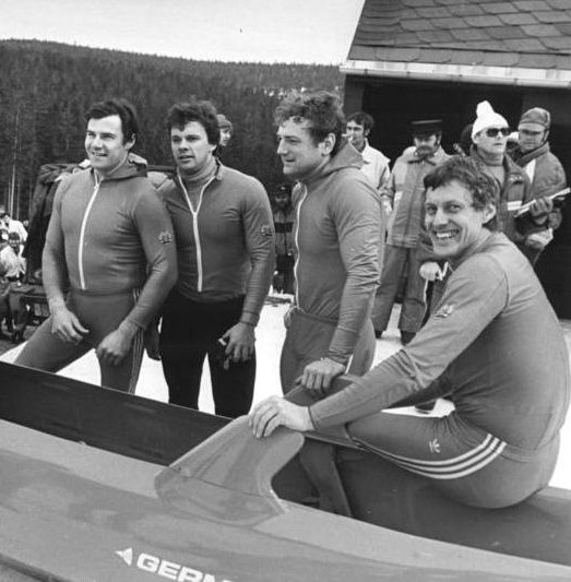 Wolfgang Hoppe, Bogdan Musiol, Ingo Voge, Dietmar Schauerhammer ADN-ZB Hiekel 22.3.87-wo-Dresden: DDR-Meisterschaften im Viererbob-DDR-Meister wurden auf der Rennschlitten- und Bobbahn Altenberg Wolfgang Hoppe, Bogdan Musiol, Ingo Voge und Dietmar Schauerhammer. (vlnr) (ASK Oberhof).